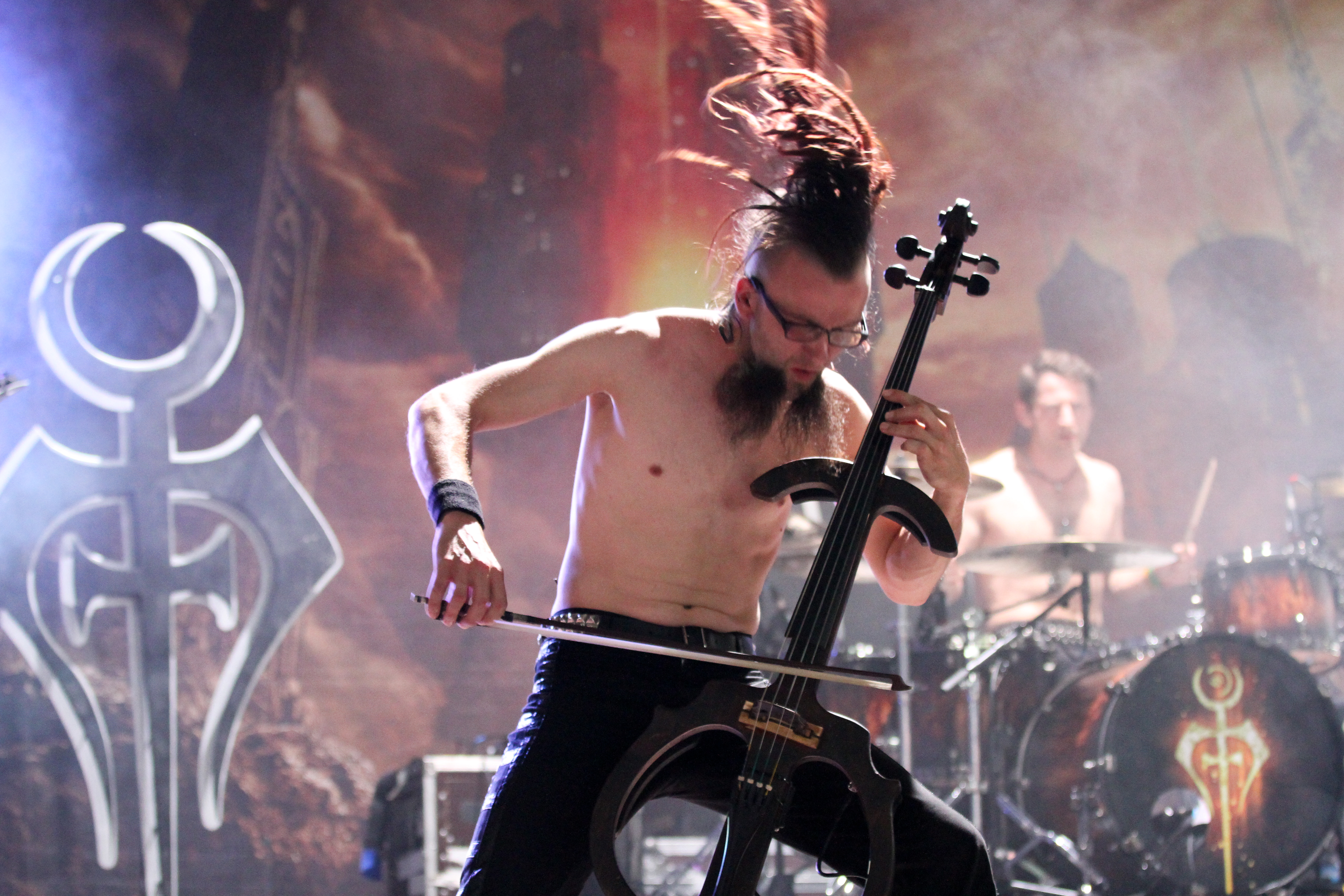 Wave-Gotik-Treffen w 2013 r. w Lipsku.